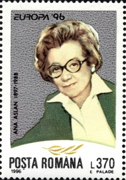 Ana Aslan